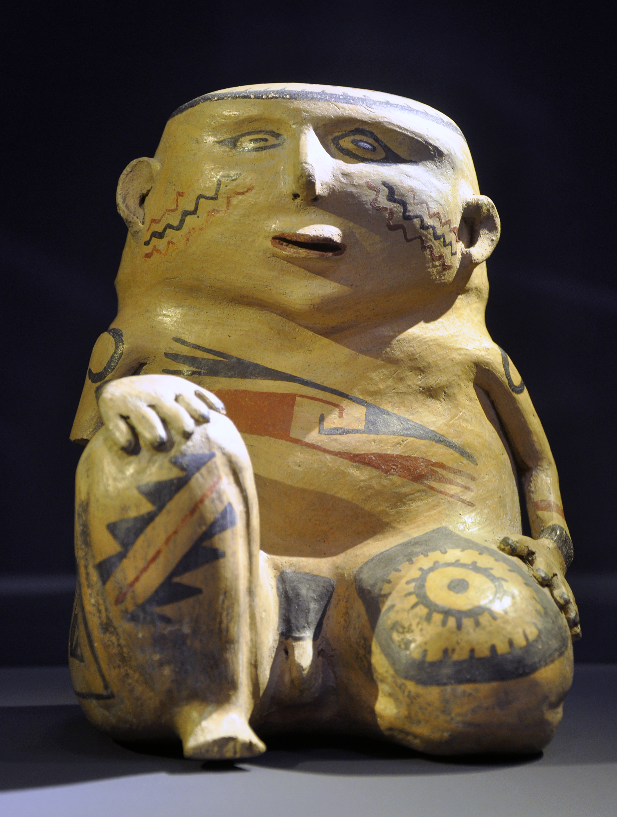 Statue d'une paire de vases représentant un couple, culture de Casas Grandes, Nord du Mexique, 1200 à 1450 + JC, style Ramos polychrome, terre cuite . Musées Royaux d'Art et d'Histoire (MRAH), Parc du Cinquantenaire, Bruxelles.